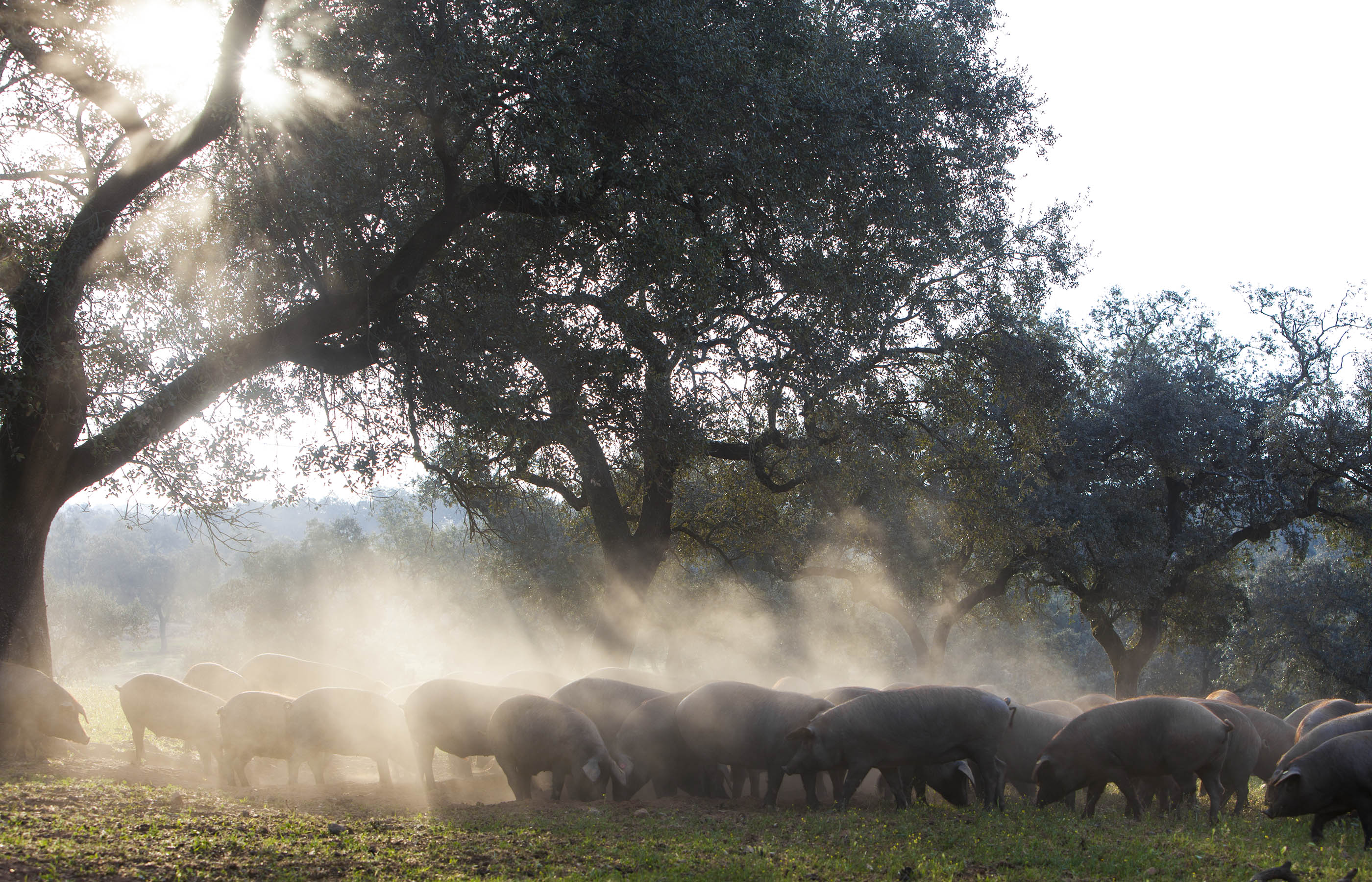 Sierra de Aracena y Picos de Aroche This is a photography of a Special Area of Conservation in Spain with the ID: ES0000051. Natura2000 entry, EEA entry